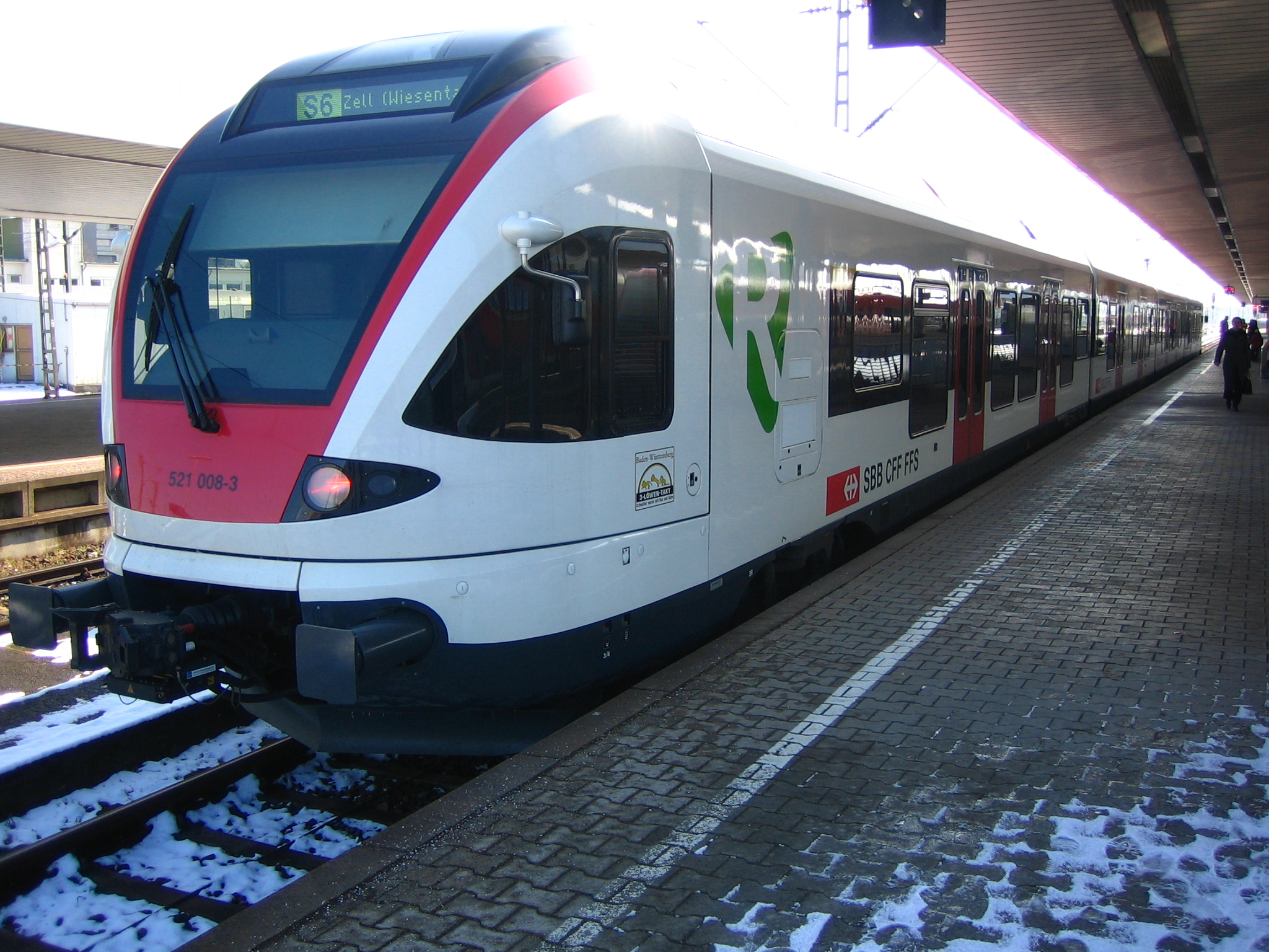 Ein FLIRT (SBB RABe 521) der Stadler Rail im Basler Badischen Bahnhof